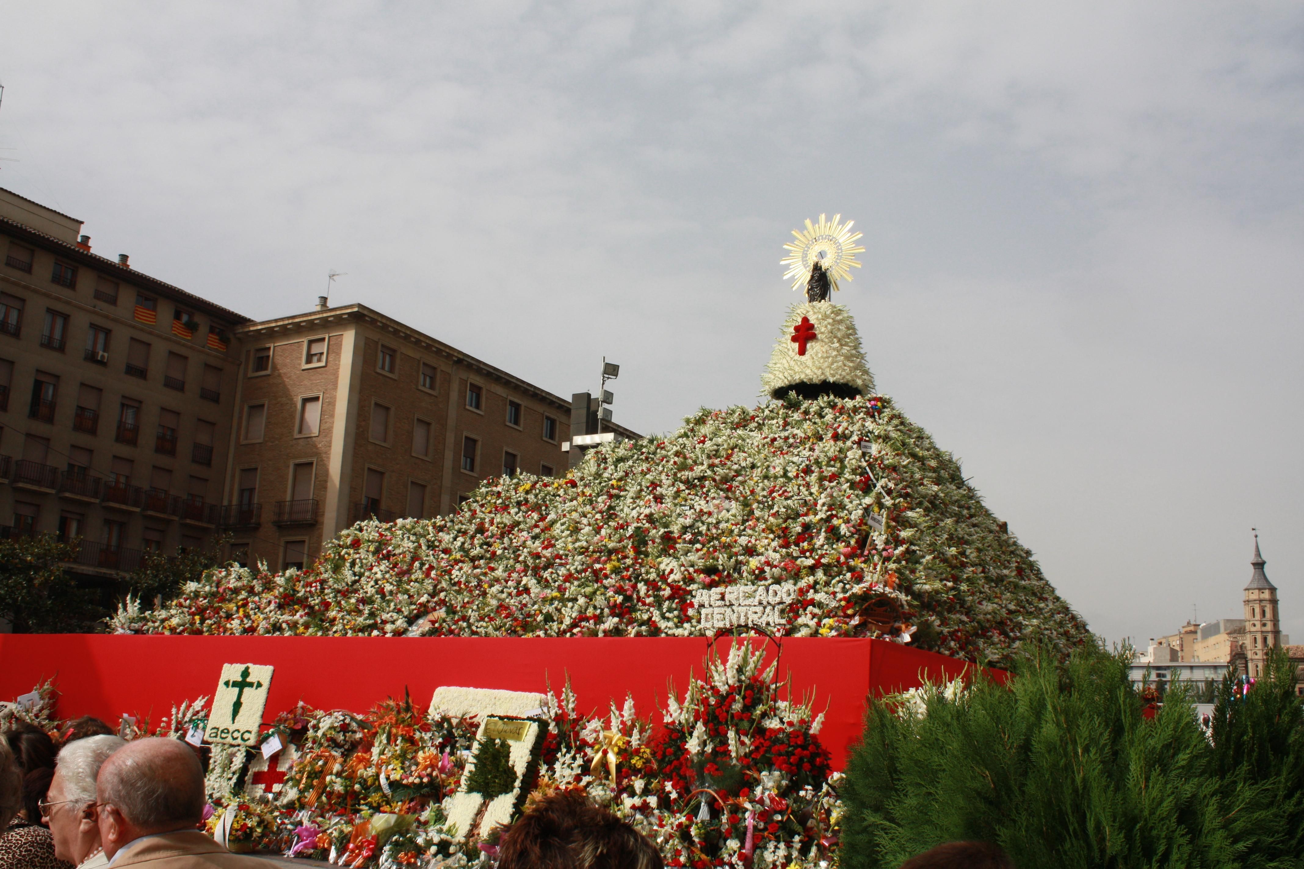 Ofrenda Floral a la Virgen del Pilar, realizada el 12 de octubre en Zaragoza, en una foto tomada el 13 de octubre de 2008. La ofrenda se mantiene durante varios días.